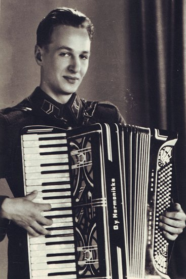 Aarno Walli